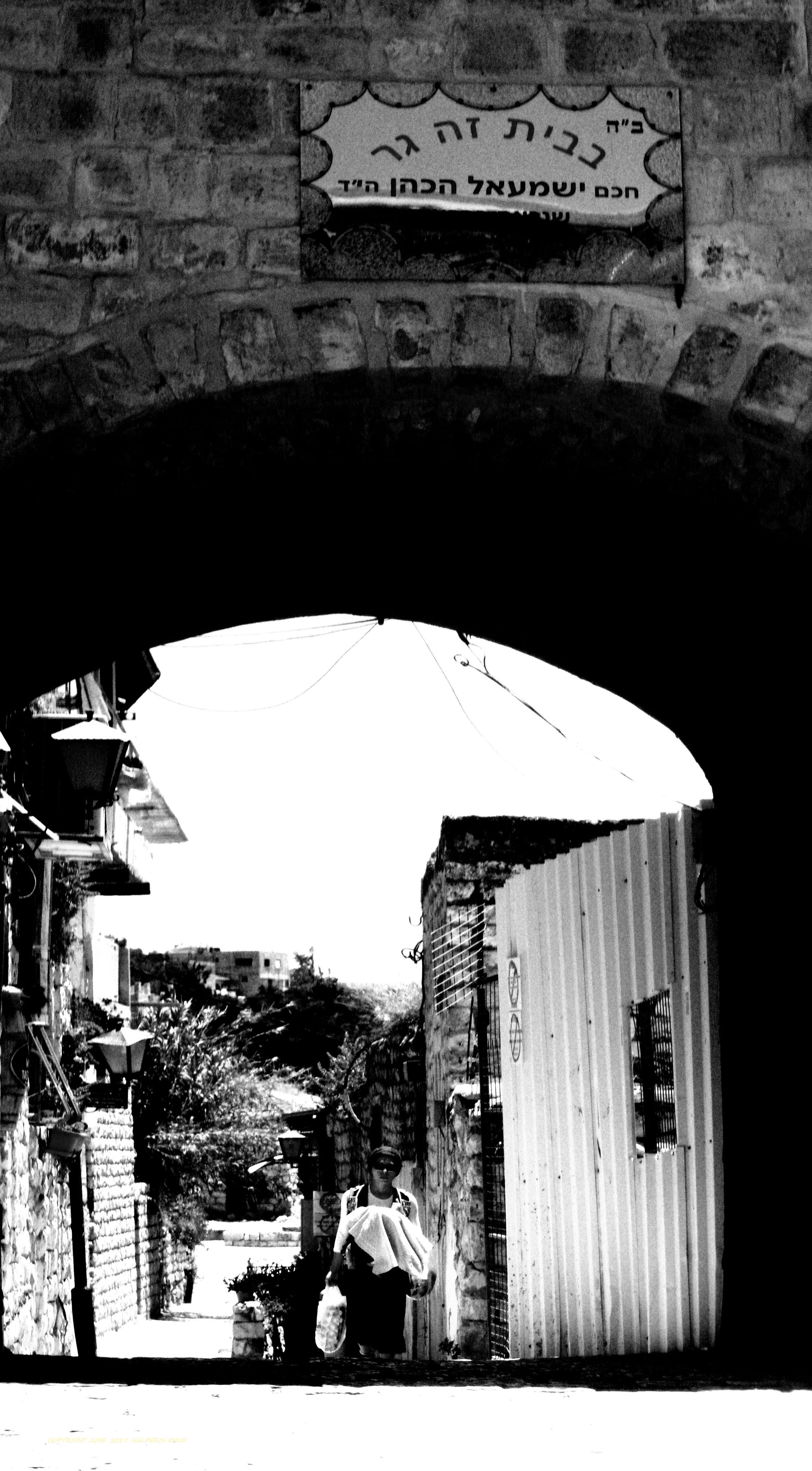 הנצחת זיכרו של הרב ישמעאל הכהן ברחוב בו נירצח בצפת במאורעות תרפט